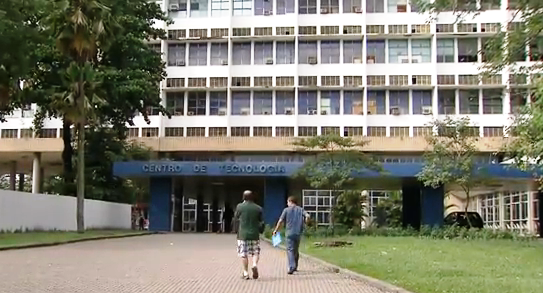 Universidade Federal do Rio do Janeiro, UFRJ, Rio de Janeiro, Brasil.